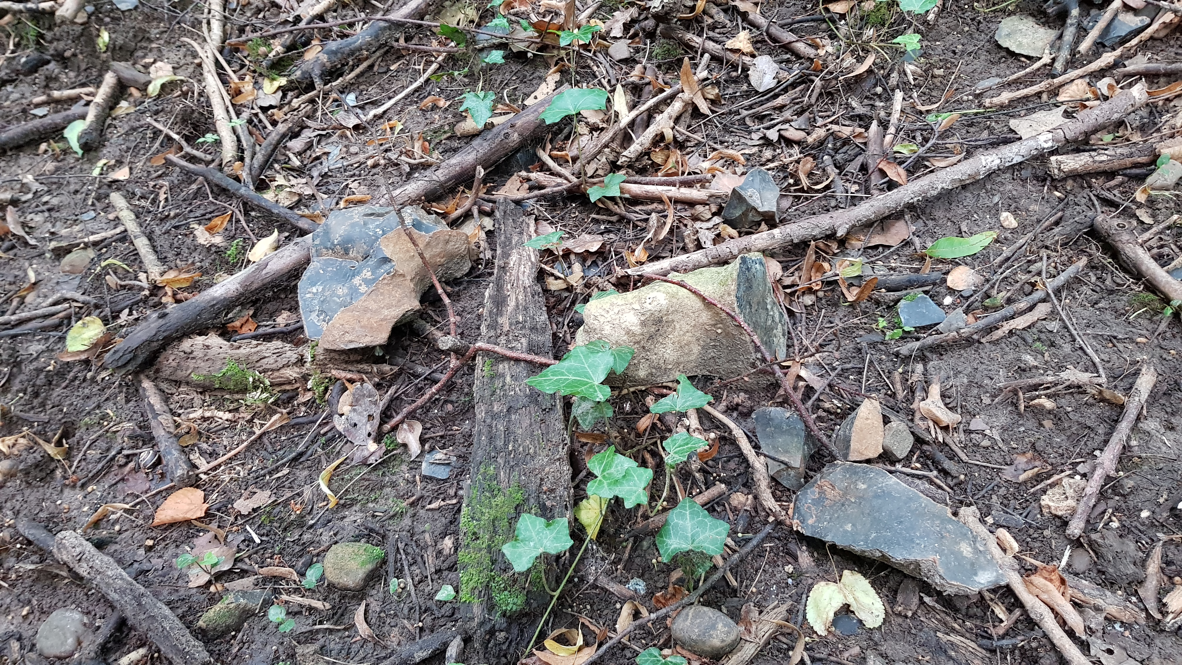 vuursteen bij Schone Grub vuursteenmijntjes in het Savelsbos, Rijckholt, Nederland